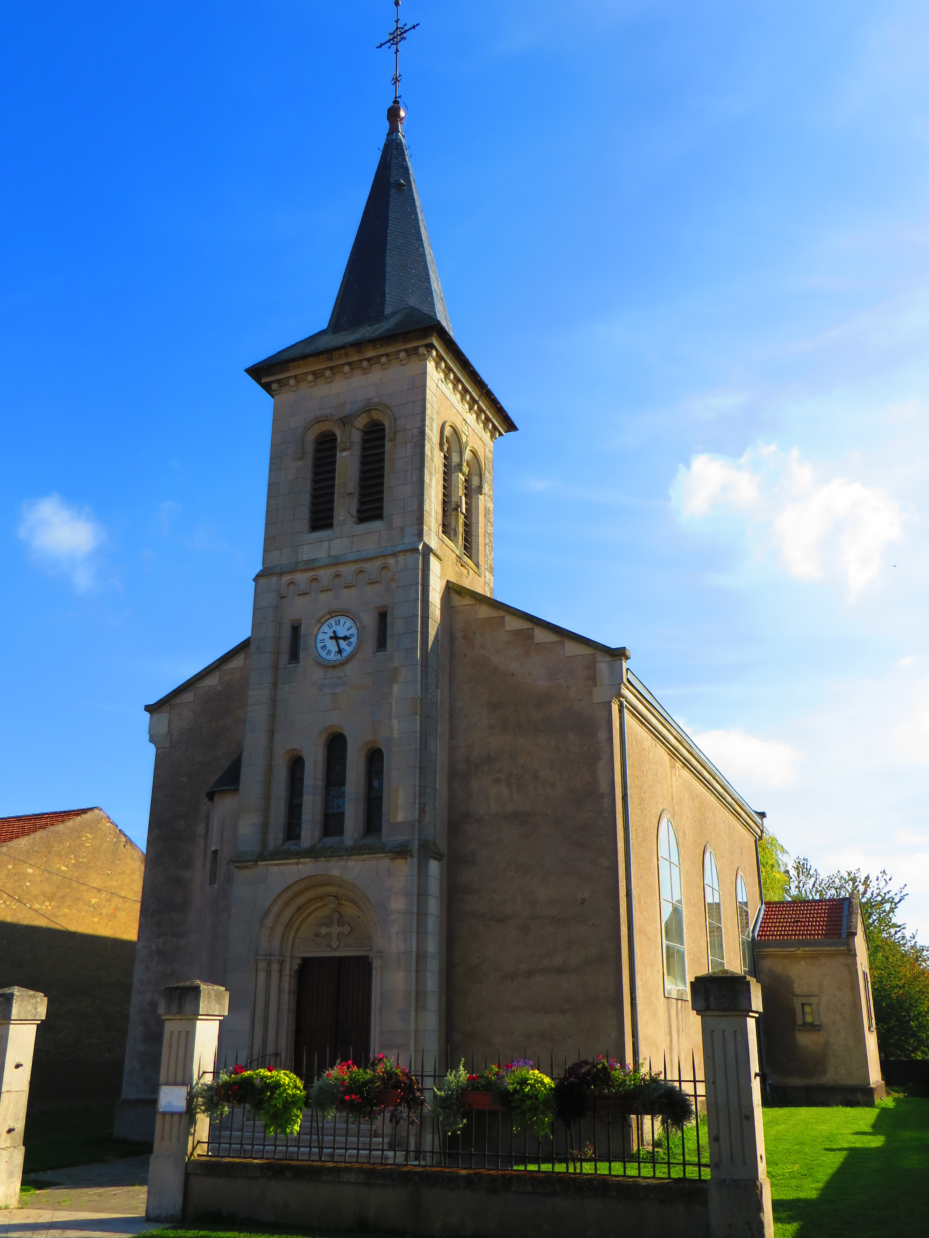 Pettoncourt l'église Saint-Clément